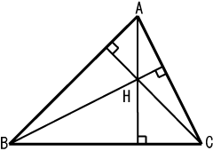 三角形の垂心。オリジナル。放棄可能な著作権をすべて放棄したPDとして利用可能です。